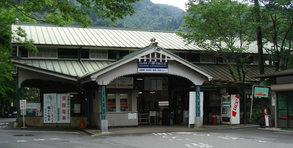 叡山電鉄叡山本線八瀬比叡山口駅駅舎 2006年7月16日に投稿者↑ＰＯＮが撮影 一部編集の上で2006年8月2日にアップロード